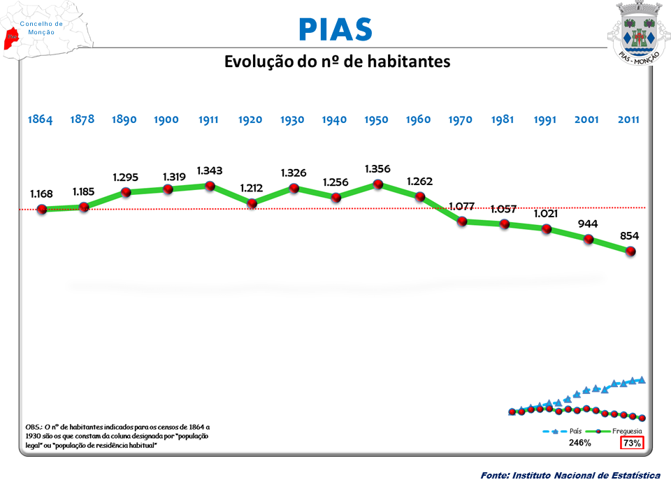 Censos 1864/2011